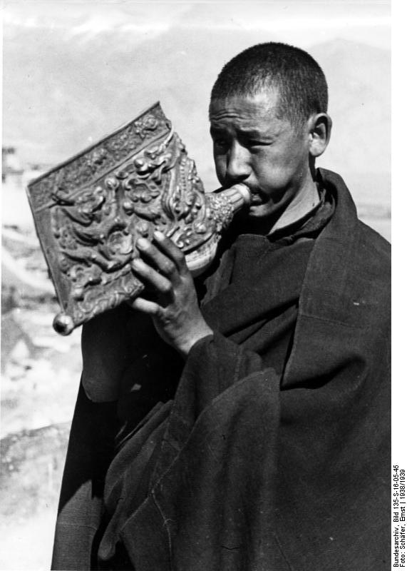 Lhasa, Lamas blasen Muscheltrompeten